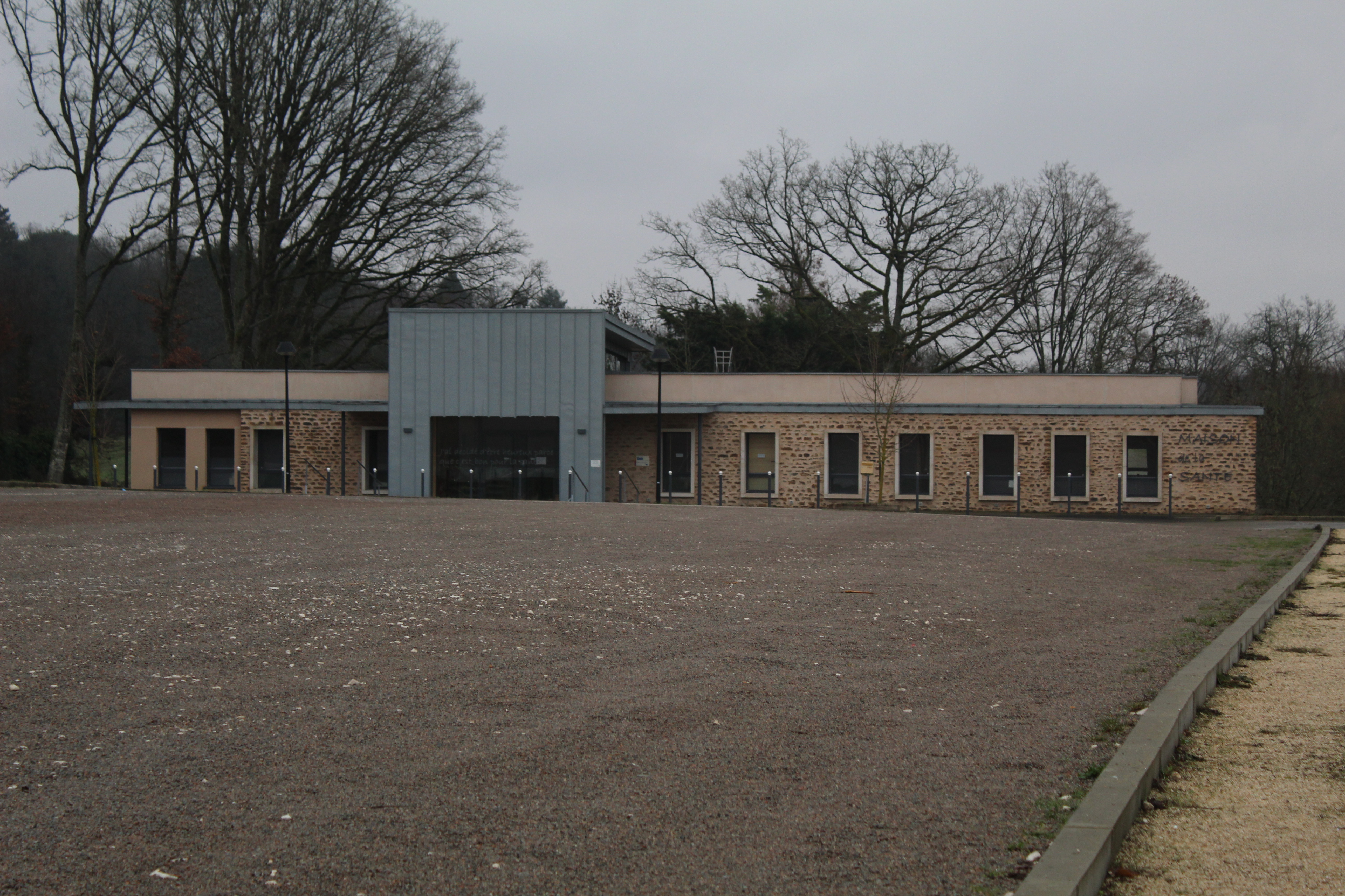 La maison de santé de Saint-Sauveur-en-Puisaye (Yonne, France).